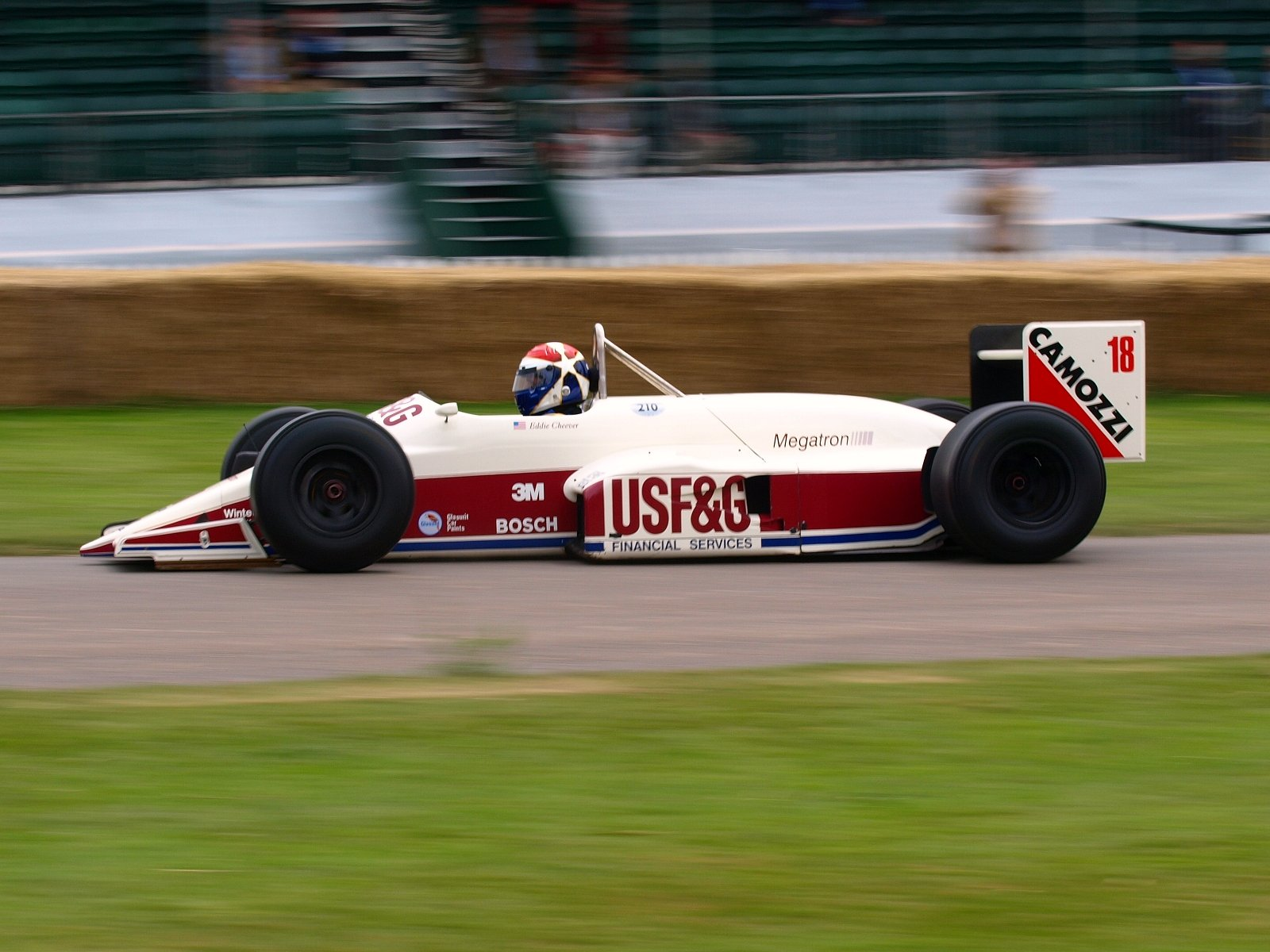 DT123997